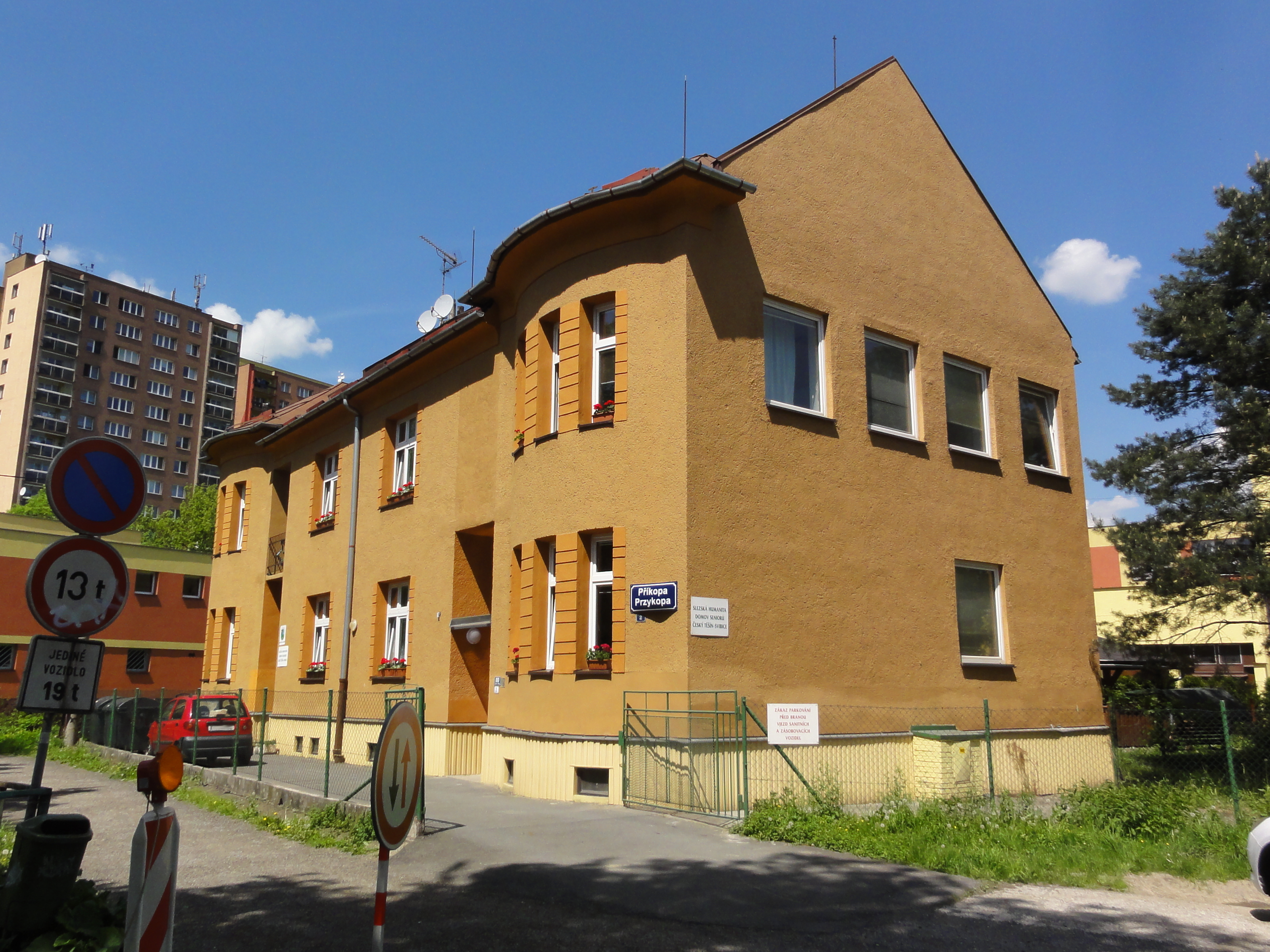 Czeski Cieszyn, Sibica, Dom Seniora